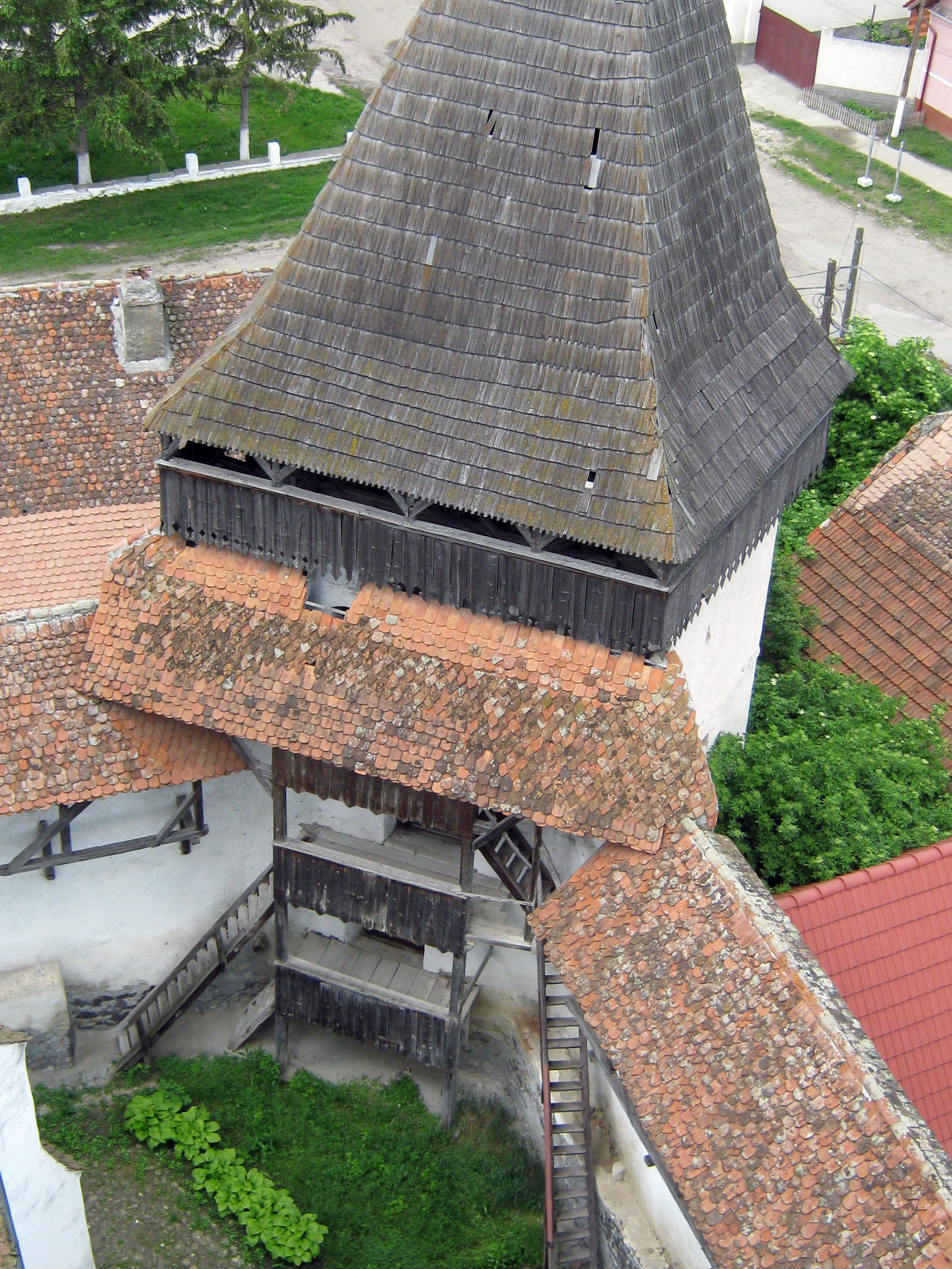 Turnul de apărare avea un rol crucial în timpul invaziilor foarte dese ale tătarilor sau turcilor când întreaga populație se retrăgea între zidurile cetății. 02